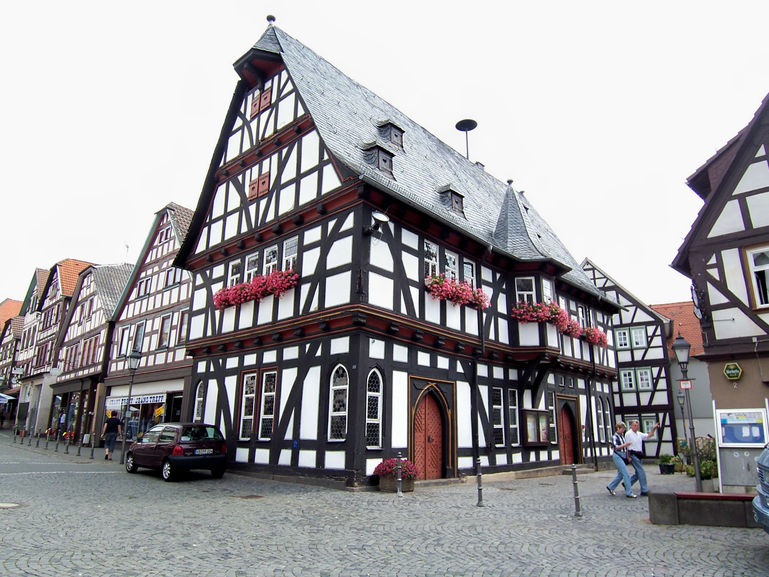 Das alte Rathaus in Schotten, Foto 2006, Matthias Monien